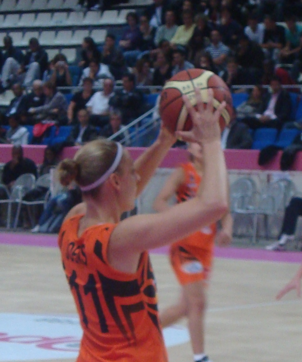 La basketteuse américaine Catherine Joens sous le maillot de Bourges